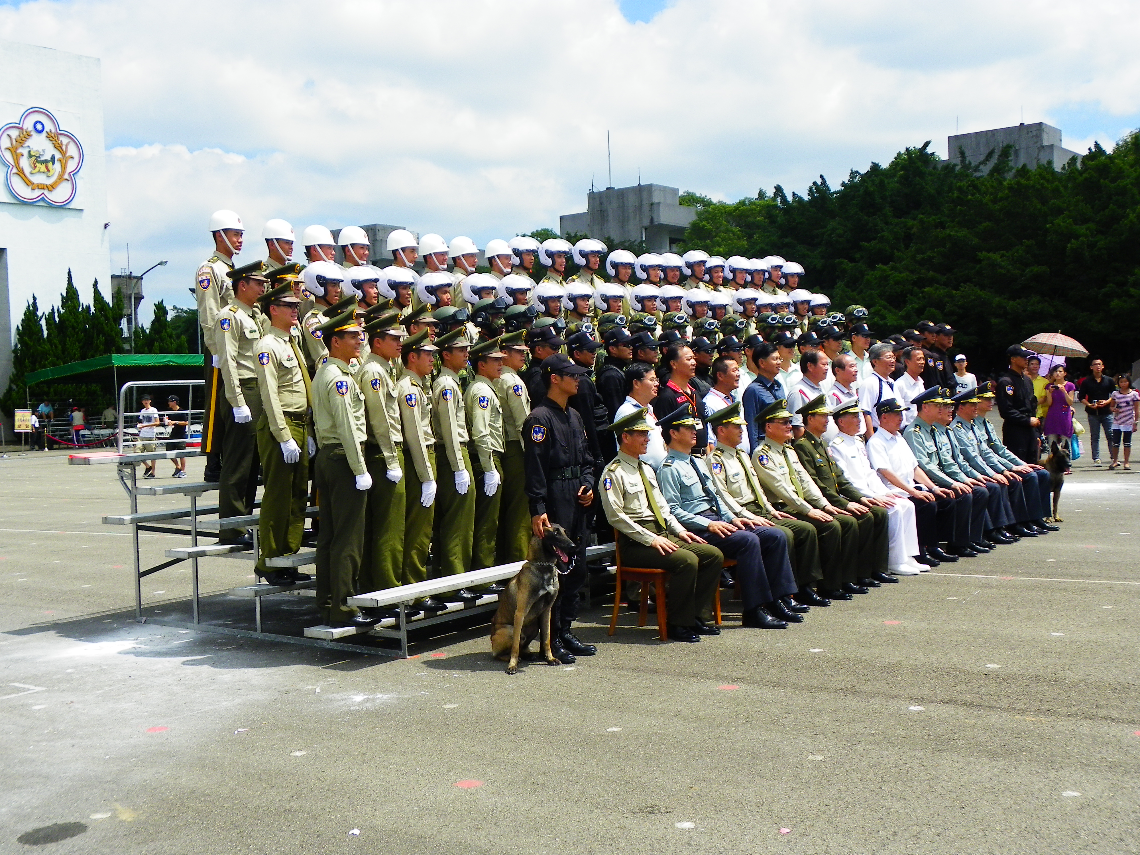 2012年憲兵學校龜山校區營區開放操演結束後，參加校閱的中華民國憲兵各單位、陸軍支援單位與主校官國防部軍備副部長高廣圻海軍上將合影紀念。左下角地面的白粉是防爆操演中，模擬爆裂物引爆後留下的痕跡。